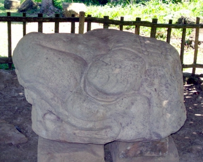 Altar M from Quirigua.